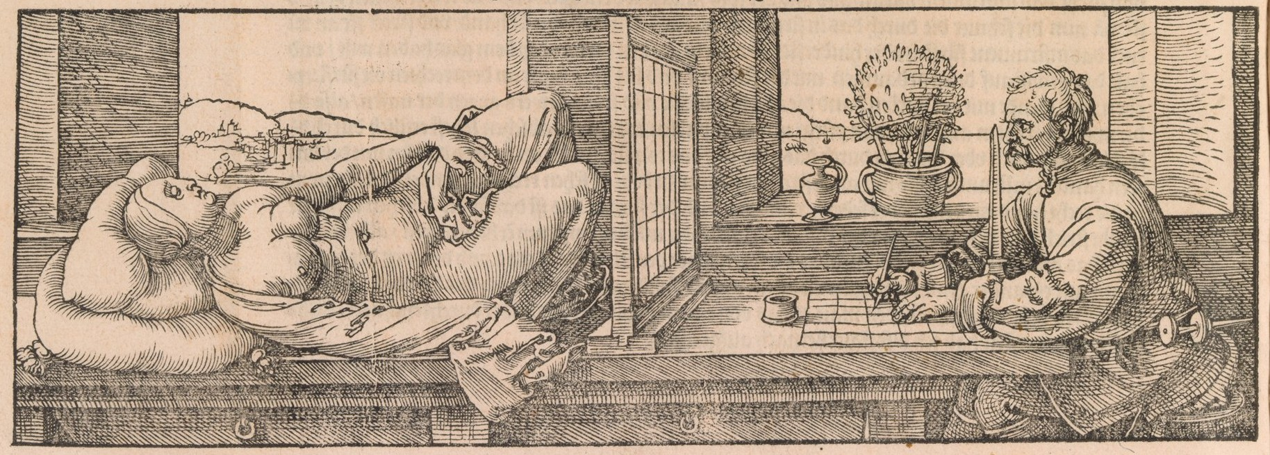 Demonstrates the use of a perspective frame (in Unterweisung der Messung mit dem Zirkel und Richtscheit. Das Lehrbuch der Malerei.